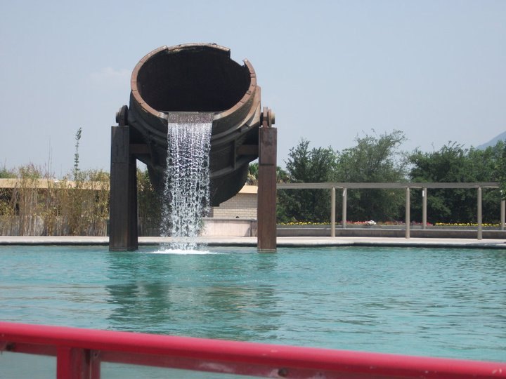 Esta en una parte de lo que es el paseo santa lucia ubicado en Monterrey, Nuevo León